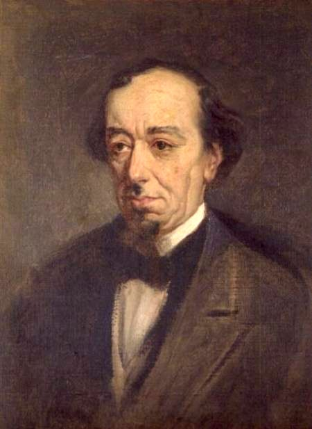 Portrait of Benjamin Disraeli (1804-1881)